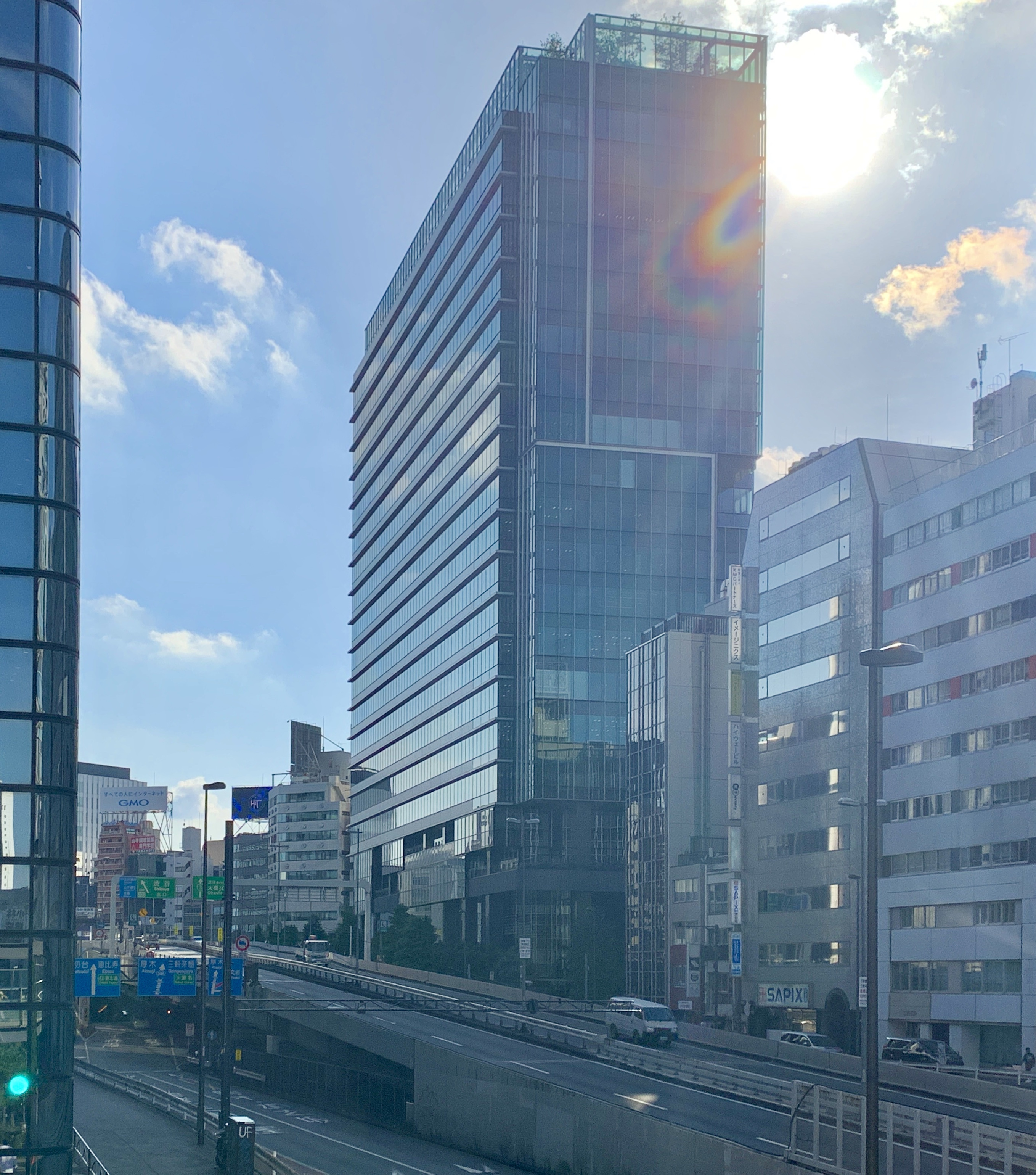 渋谷ソラスタ、セルリアンタワー東急ホテルより撮影